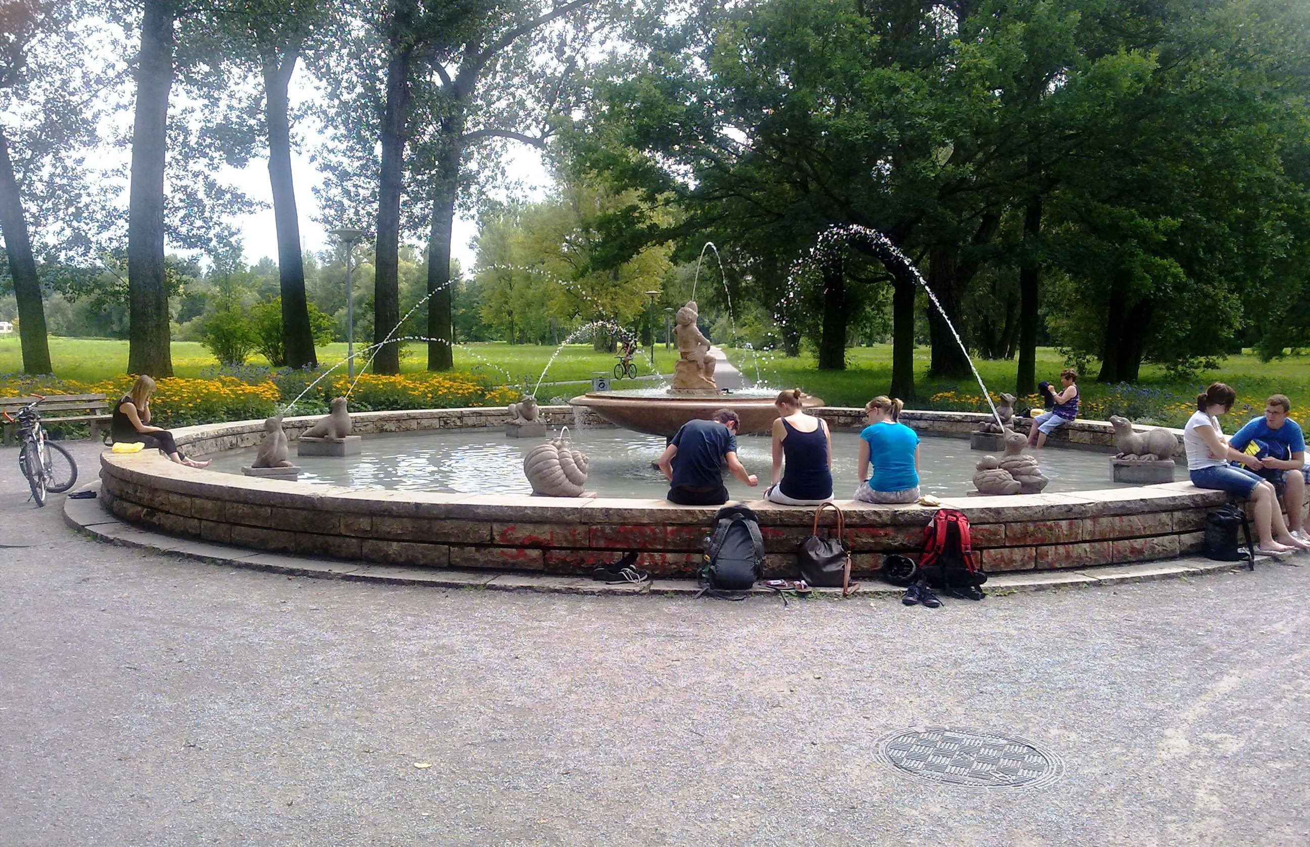 Märchenbrunnen im Park